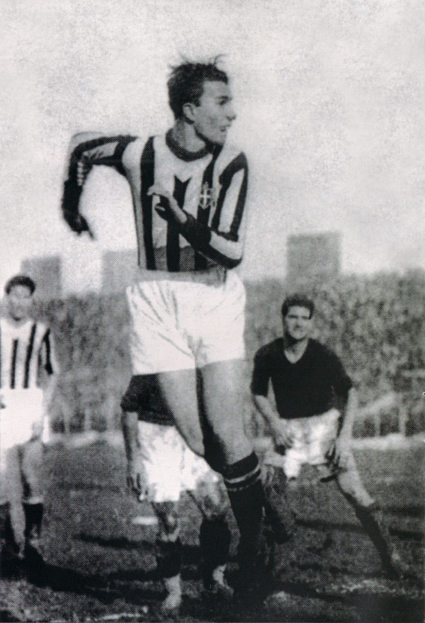 Il calciatore italiano Felice Placido Borel detto "Farfallino", talvolta accreditato come Borel (II), in azione con la maglia della Juventus nel 1934.